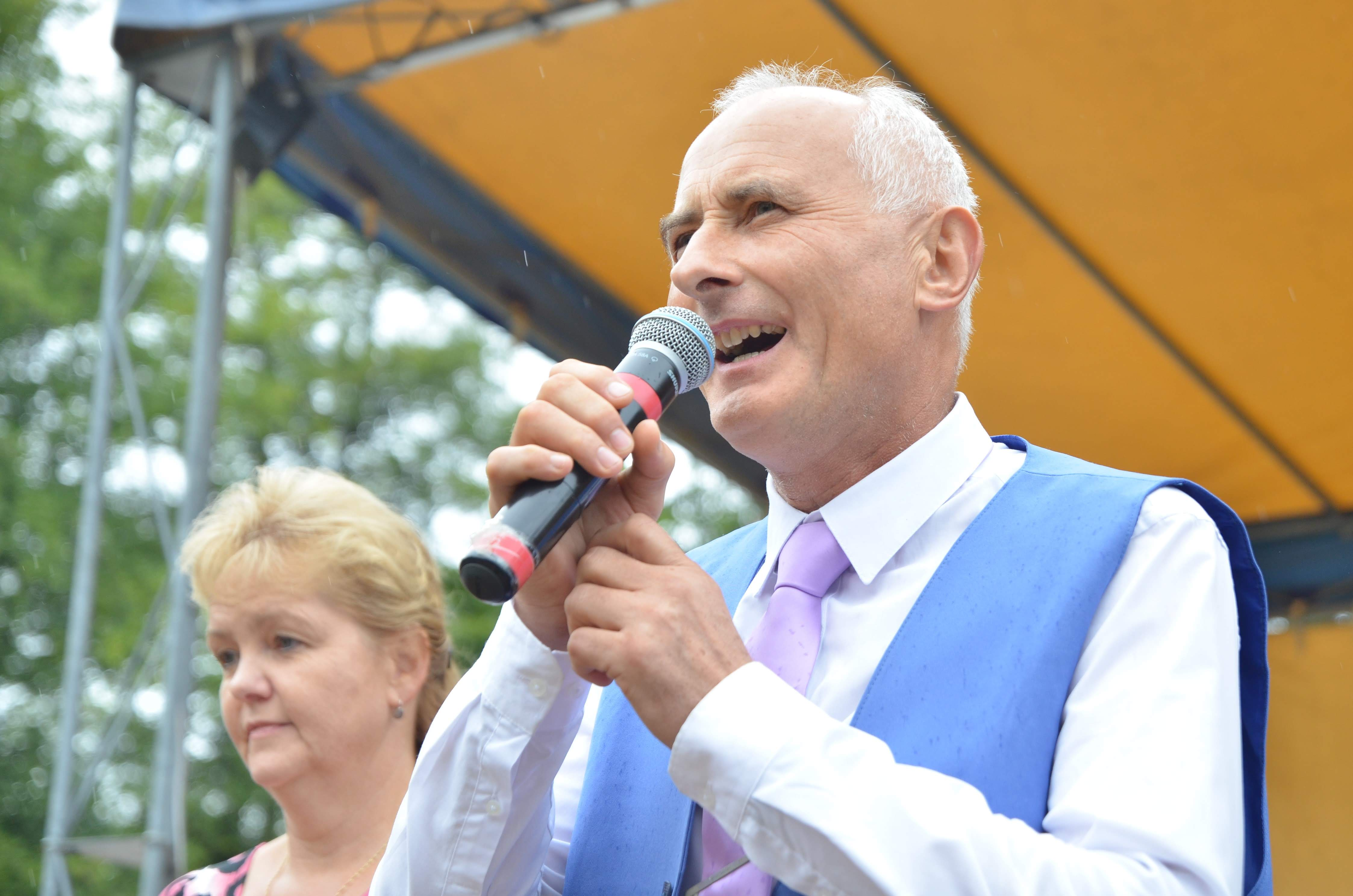 Jiří Jína, kapelník dechové hudby Táboranka. V Košťálově na přehlídce dechových hudeb.